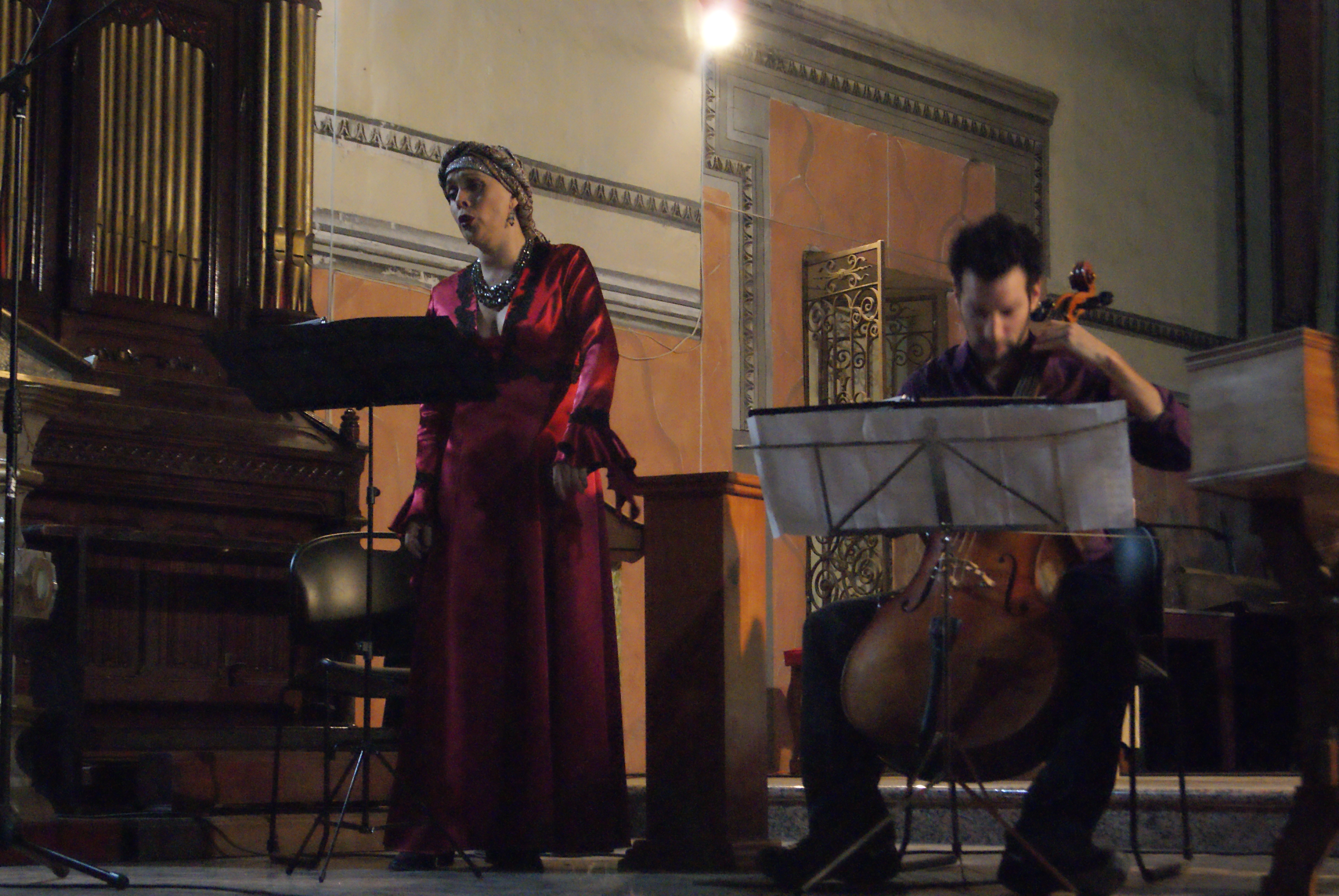 Concierto del Ensamble Galileo, con Rita Guerrero, en la Capilla de San Ildefonso, Puebla, durante el Festival Pasión (abril de 2010)